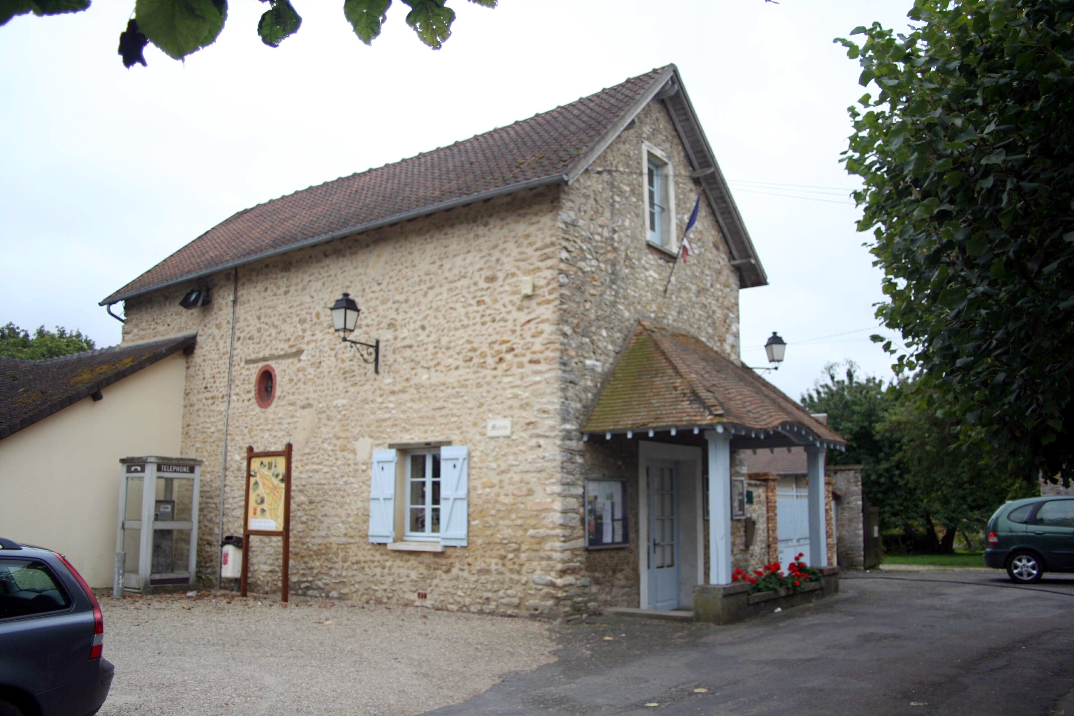 Mairie de Saint-Pierre-de-Bailleul, Eure (France)